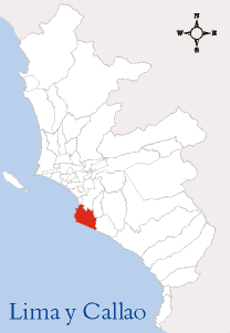 Localización del distrito de Chorrillos Esta imagen ha sido elaborada por --Edgardo Reyes 18:26 9 mar, 2005 (CET) Categoría:Mapas del Perú (imagen)